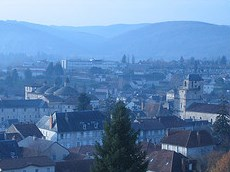 Vue générale de Souillac, Lot, France.